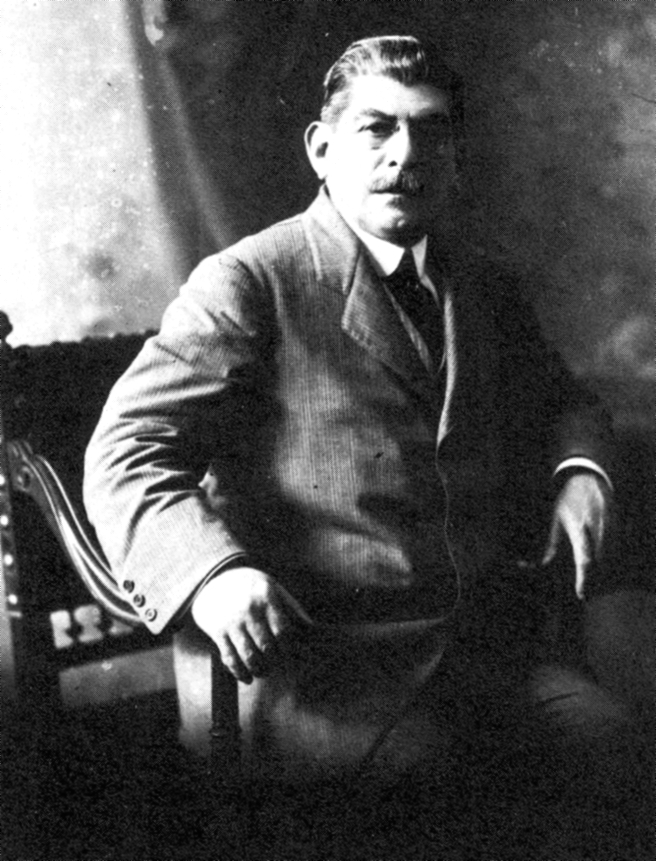 José Payán (1844-1919) economista y banquero cubano, que se estableció en el Perú en 1875.